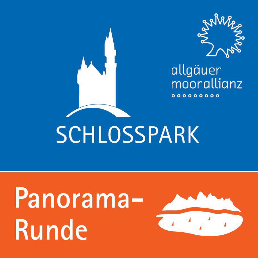 Logo Panorama-Runde